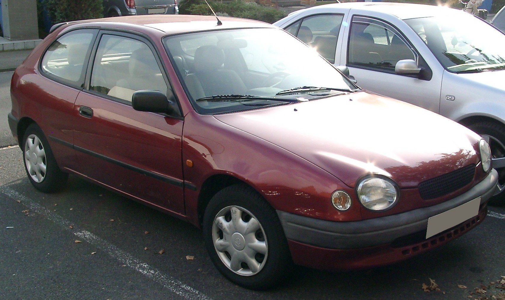 Toyota Corolla